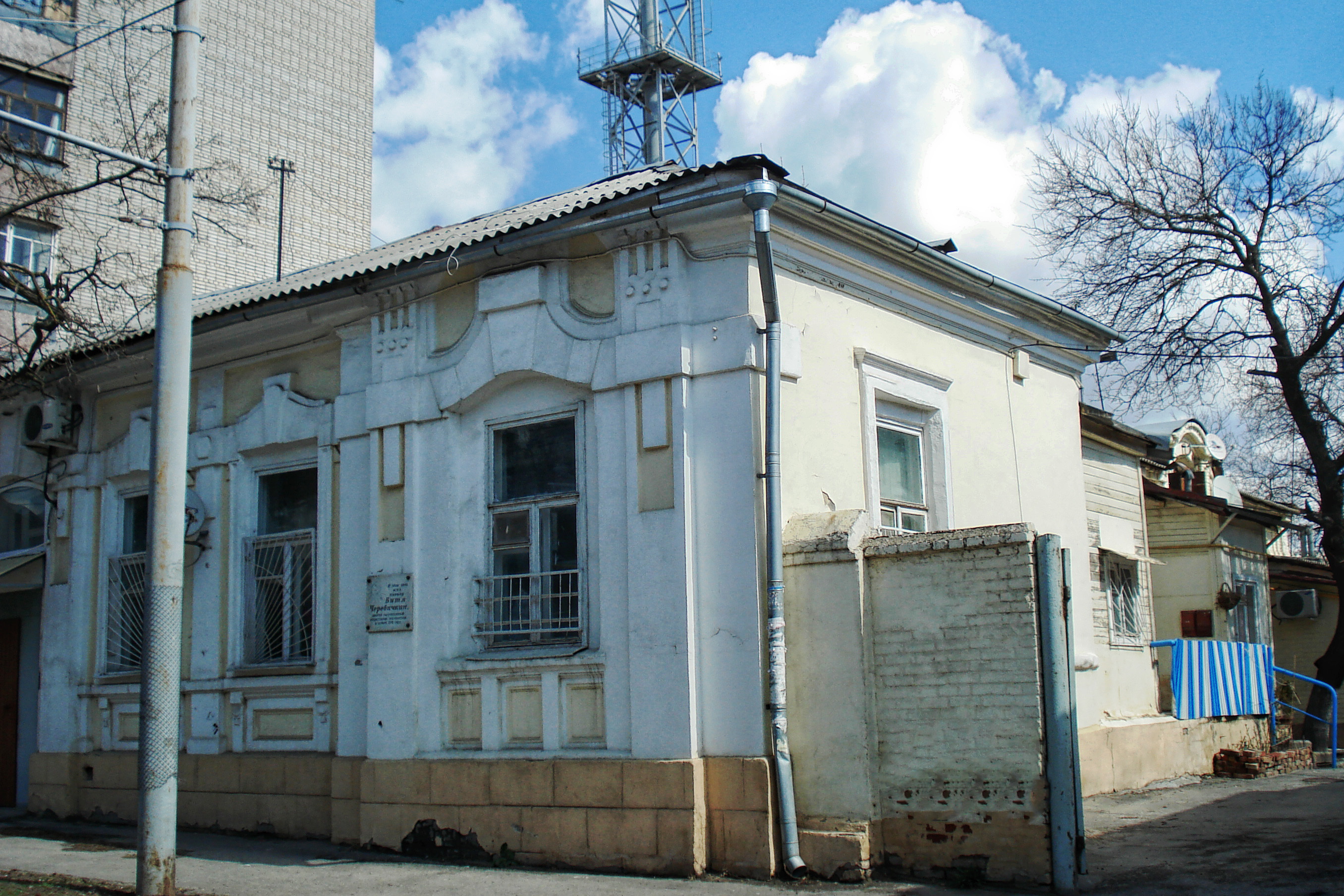 Дом С. Бароновой, в котором жилВ. Черевичкин: улица 28-я линия, 11/6, улица Черевичкина, литер Б, Ростов-на-Дону, Ростовская область